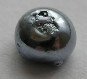 La bildo estas kopiita de de. La originala priskribo estas: * Bildbeschreibung: 1g Osmium * Quelle: Foto aus meiner Elementesammlung * Fotograf/Zeichner: Tomihahndorf * Datum: März 2006